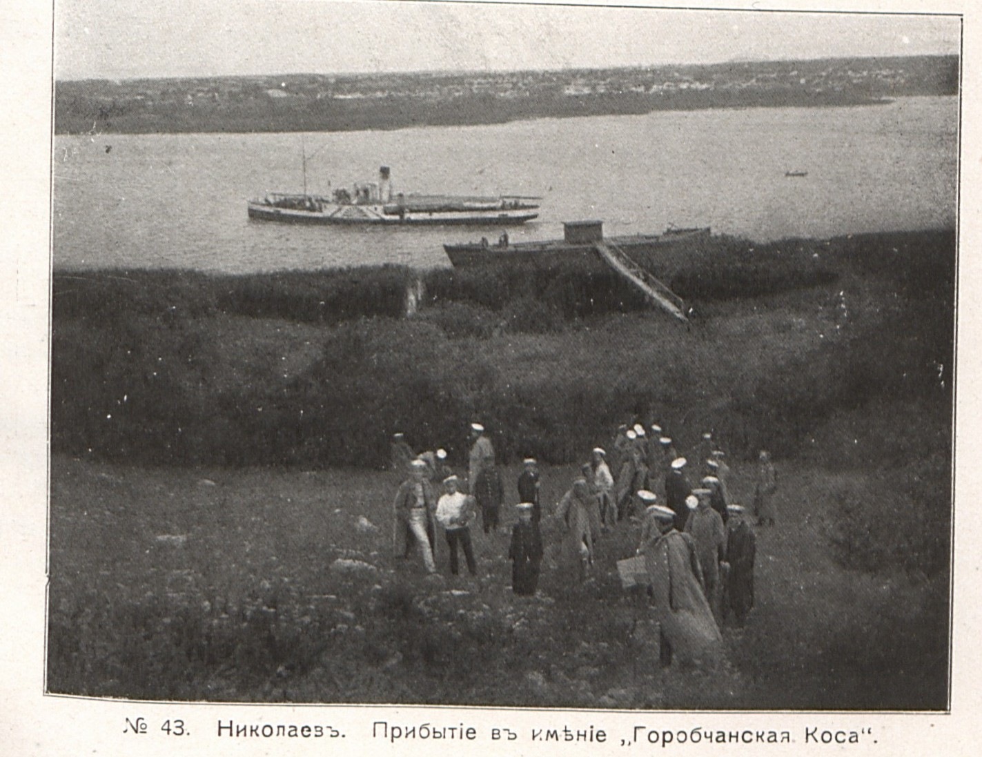 На юге России и в Крыму